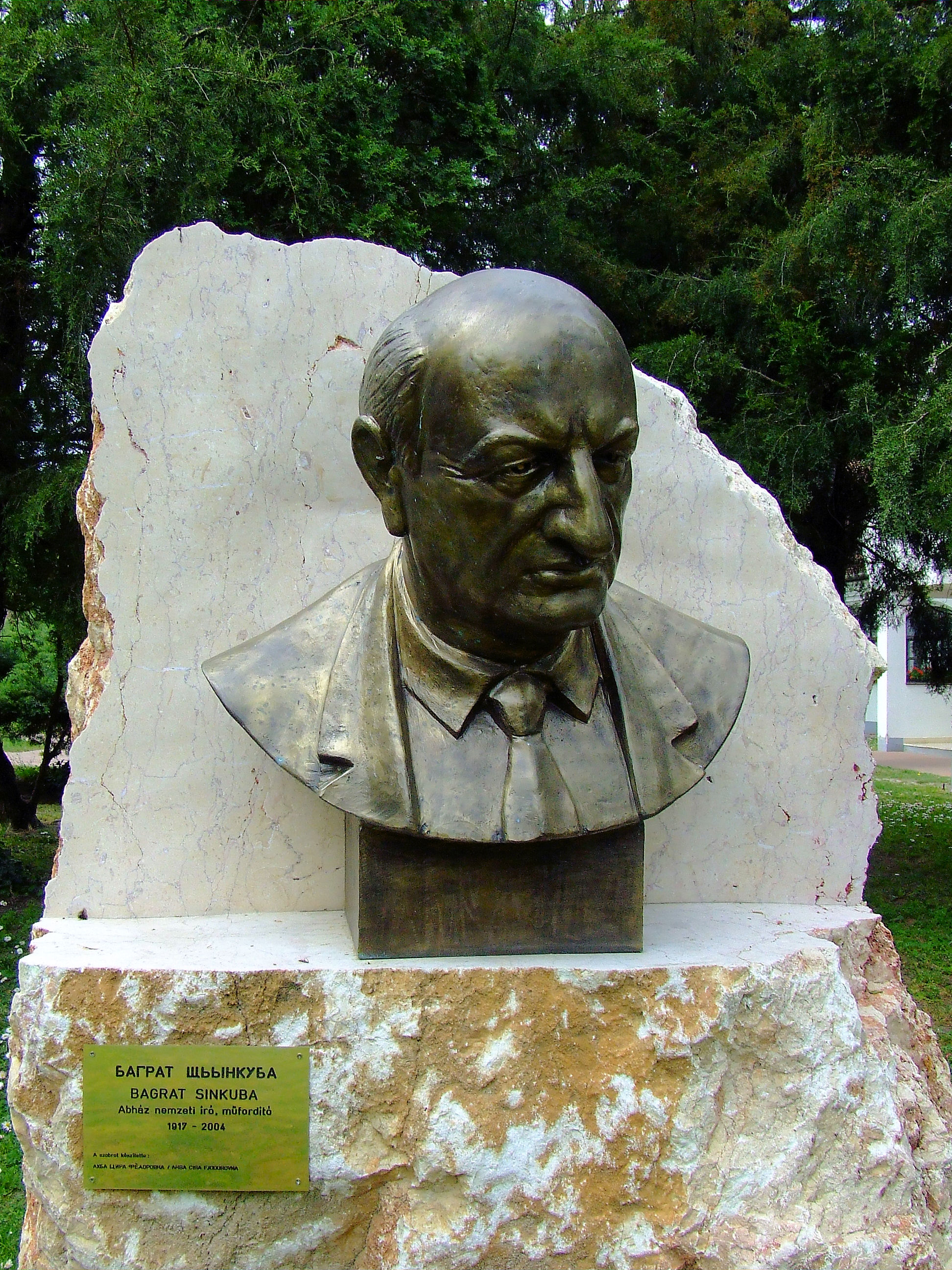 Bagrat Sinkuba (1917-2004) abház költő és műfordító szobra Kiskőrösön, Petőfi Sándor fordítóinak szoborparkjában. Ahba Cira Fjodorovna alkotása (2010)